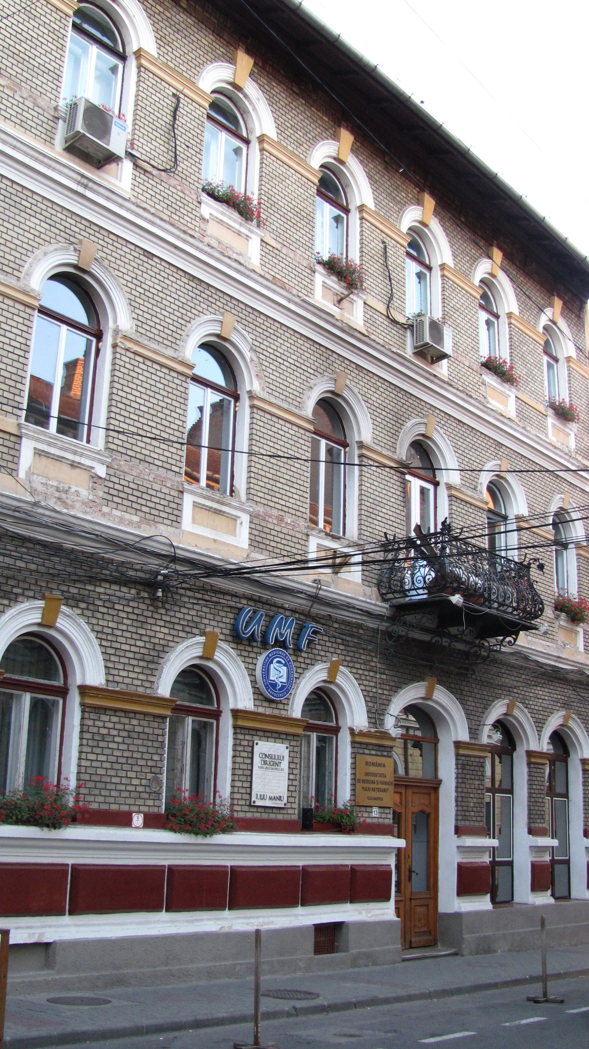 Cluj-Napoca - Str. Emil Isac, Nr.13 - Universitatea de Medicină si Farmacie "Iuliu Hațieganu", Casa Memorială-fost sediu a Consiliului Dirigent Inscriptie: " În această clădire a fost Sediul Consiliului Dirigent Toamna anului 1919-aprilie 1920 Organism românesc provizoriu de integrare a Transilvaniei dupa Marea Unire în cadrul Statului Național Unitar Român, avându-l ca președinte pe Iuliu Maniu 9 decembrie 1994"